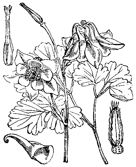 Slika 47. Navadni konj. (Aquilégia vulgáris.)